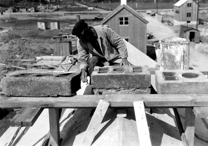 Murning av skorsten till husbygge i Svedmyras småstugeområde